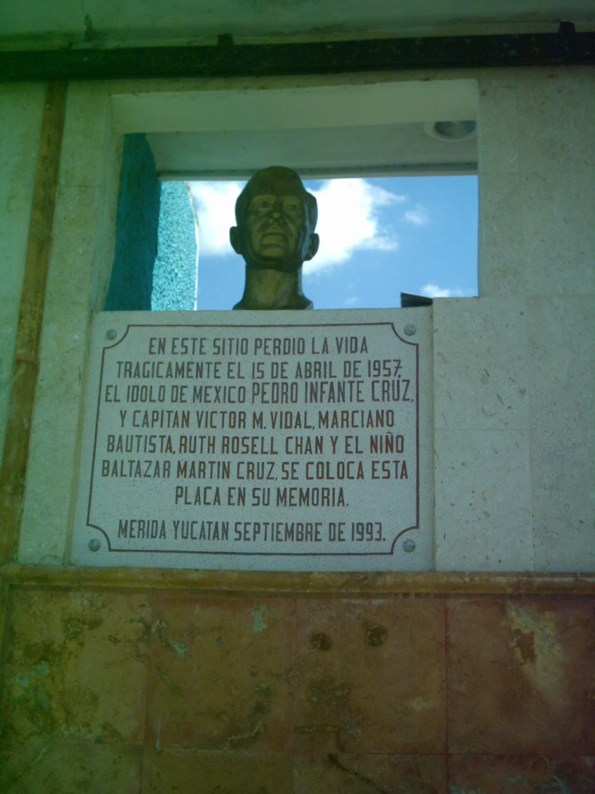 Busto a Pedro Infante Cruz en la vía pública señalando el domicilio donde ocurrió el accidente aéreo donde murió, la obra de arte es de autor desconocido